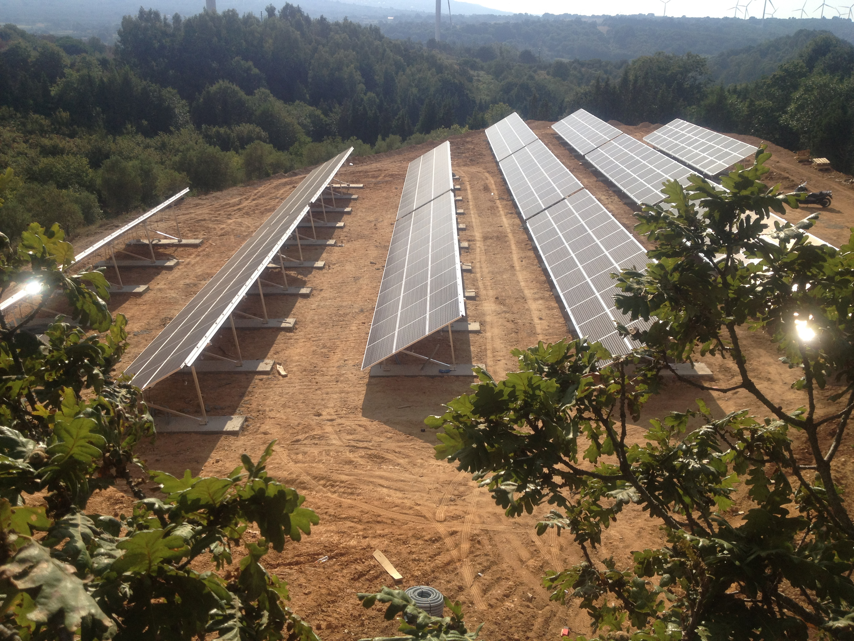 Bosco di Policoro This is a photo of a monument which is part of cultural heritage of Italy. The authorisation for taking photos of this object was provided by the World Wide Fund for Nature Italy.